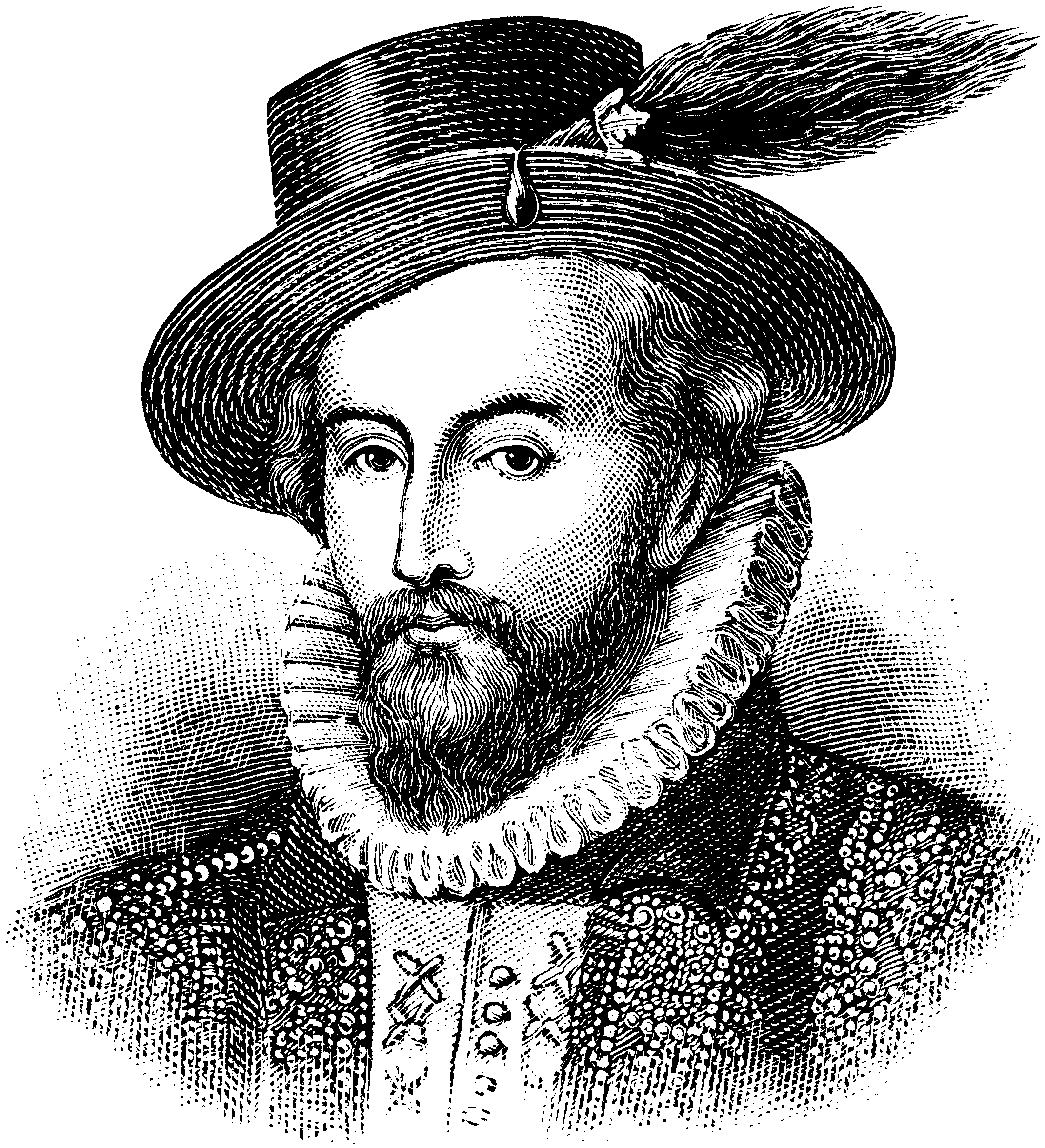 Sir Walter Raleigh (1522-1618)